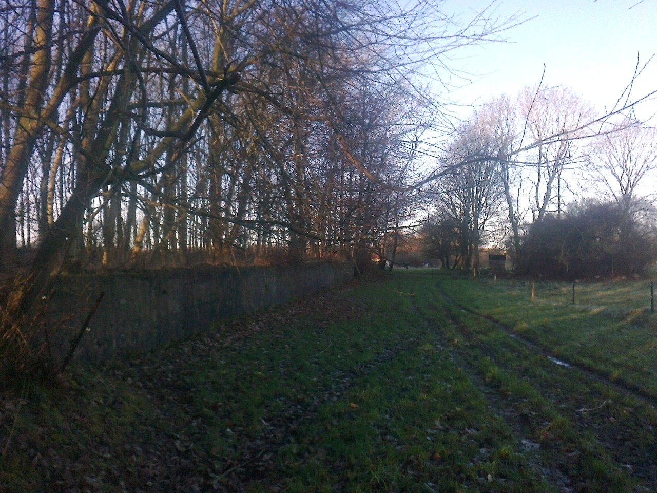 Inde i skoven er der en betonrampe